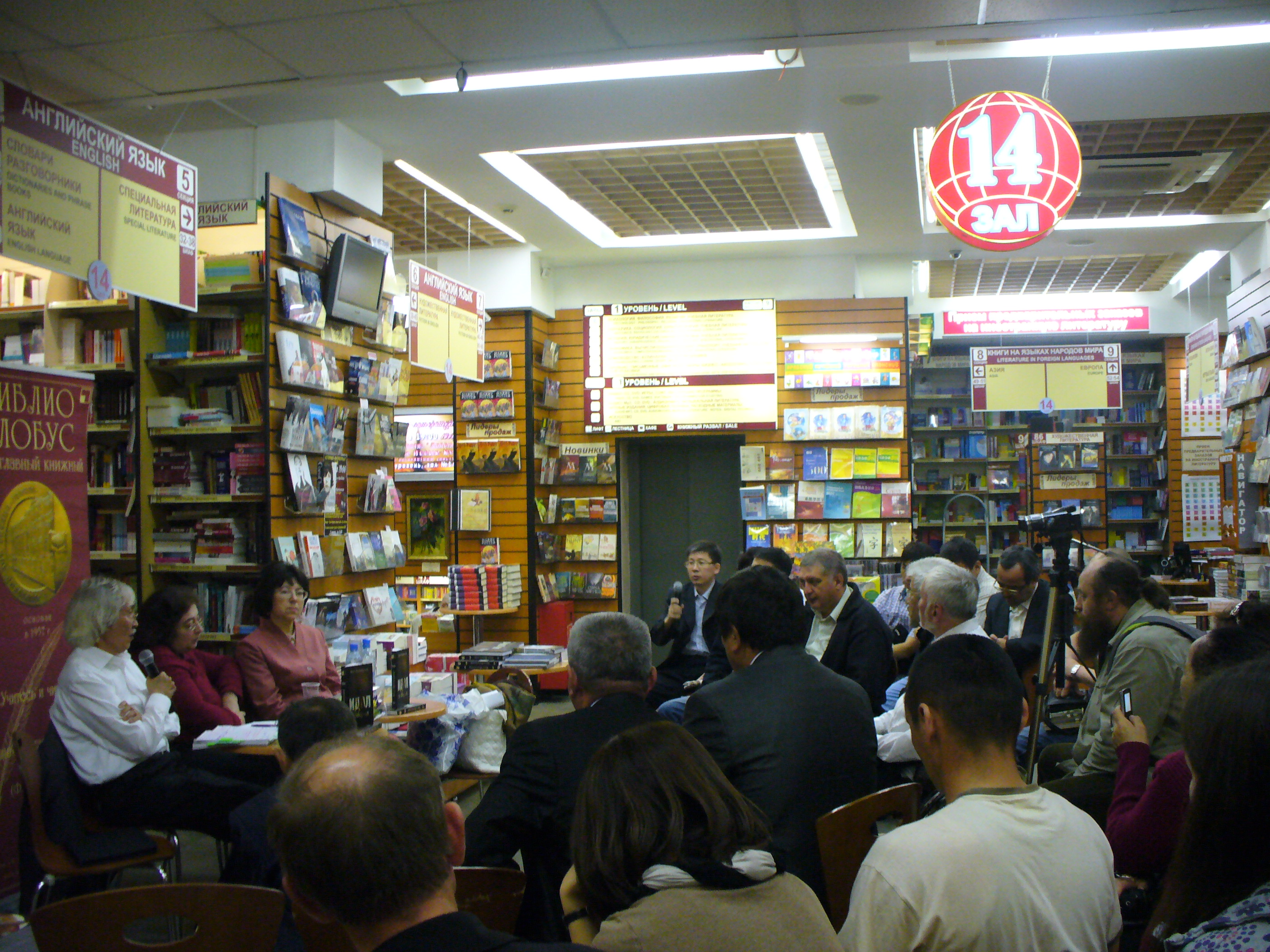 В Московском книжном магазине